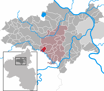 Kollig in Rhineland-Palatinate - district Mayen-Koblenz